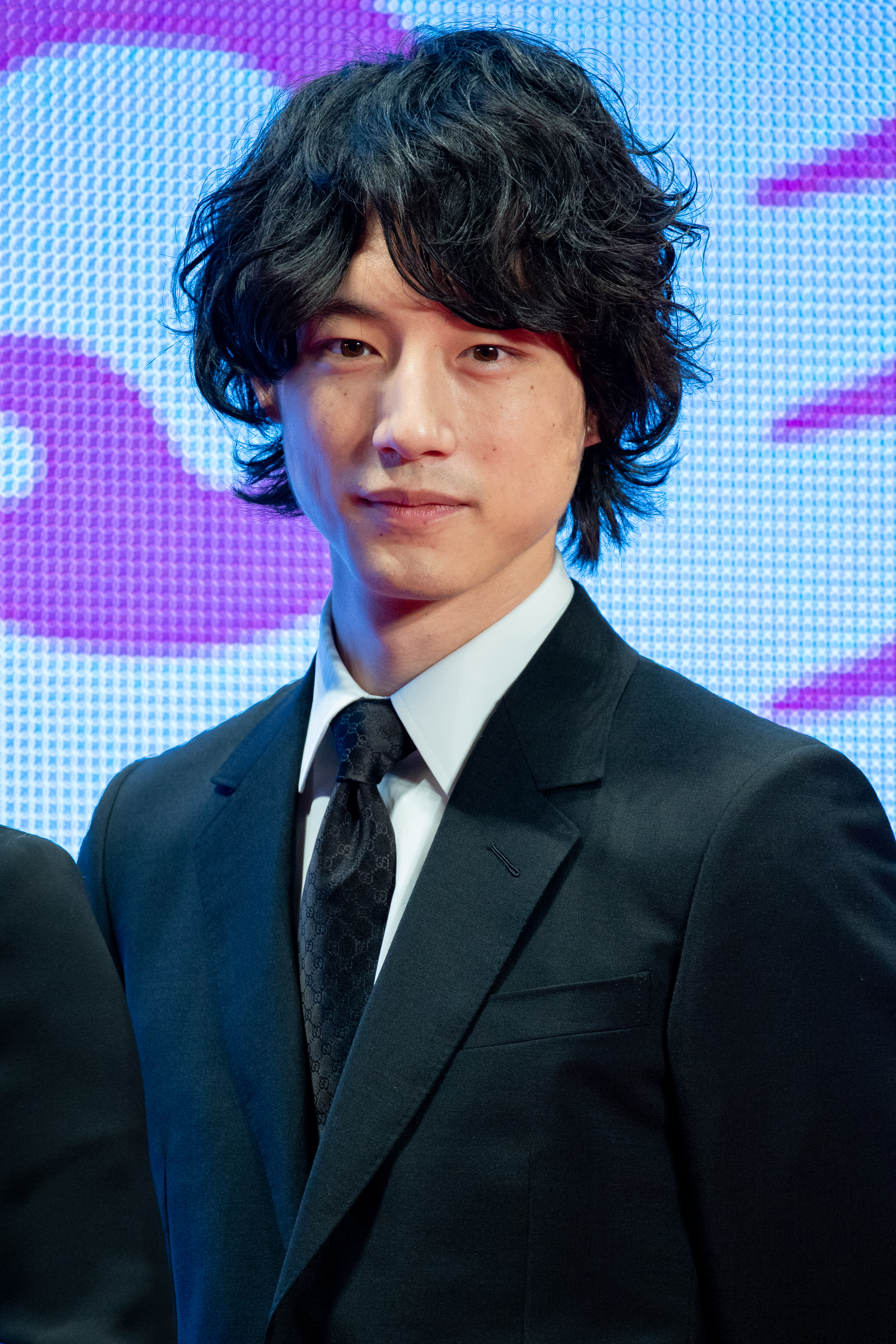 第30回 東京国際映画祭 人魚の眠る家 レッドカーペットイベント 坂口健太郎